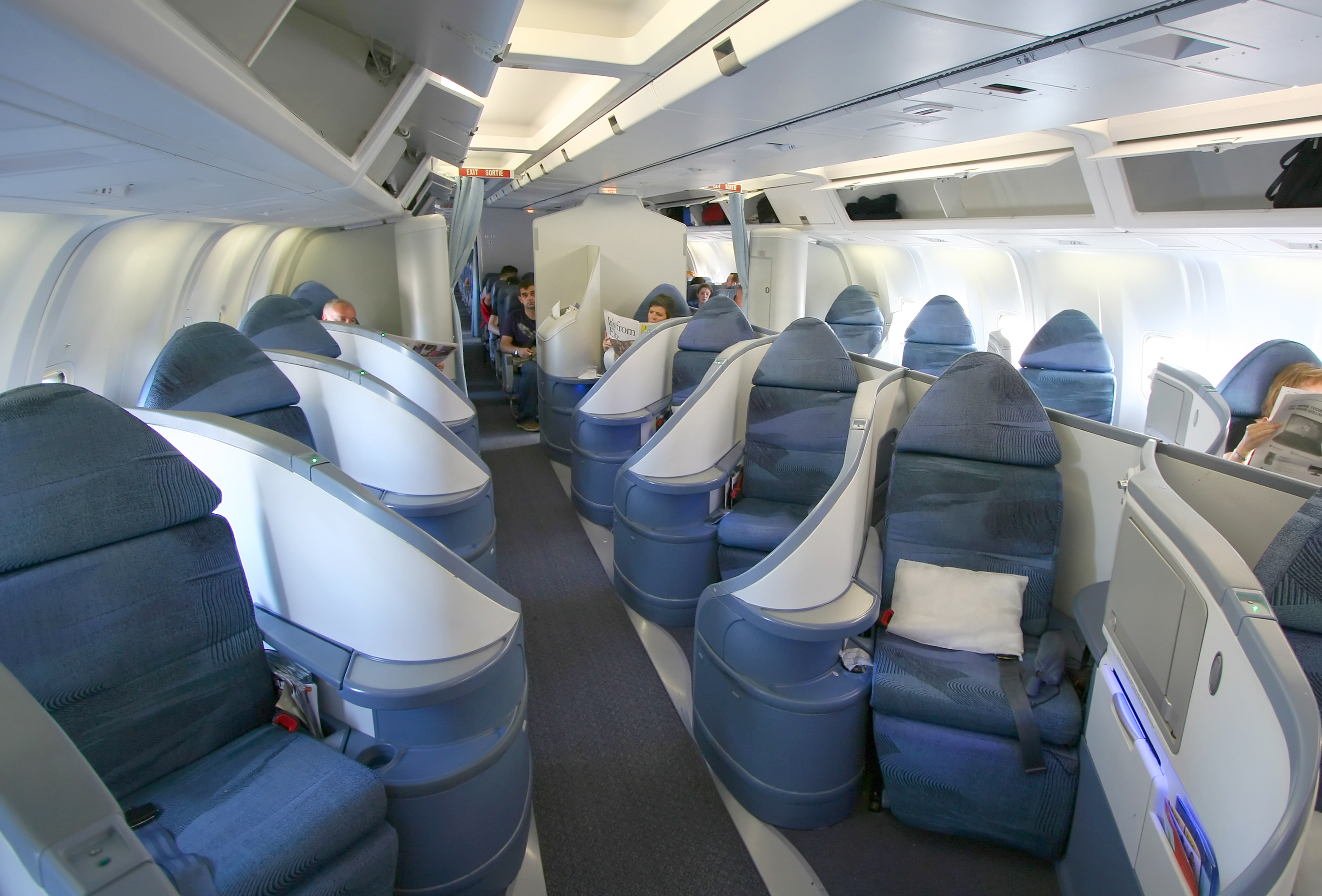 Air Canada Pods